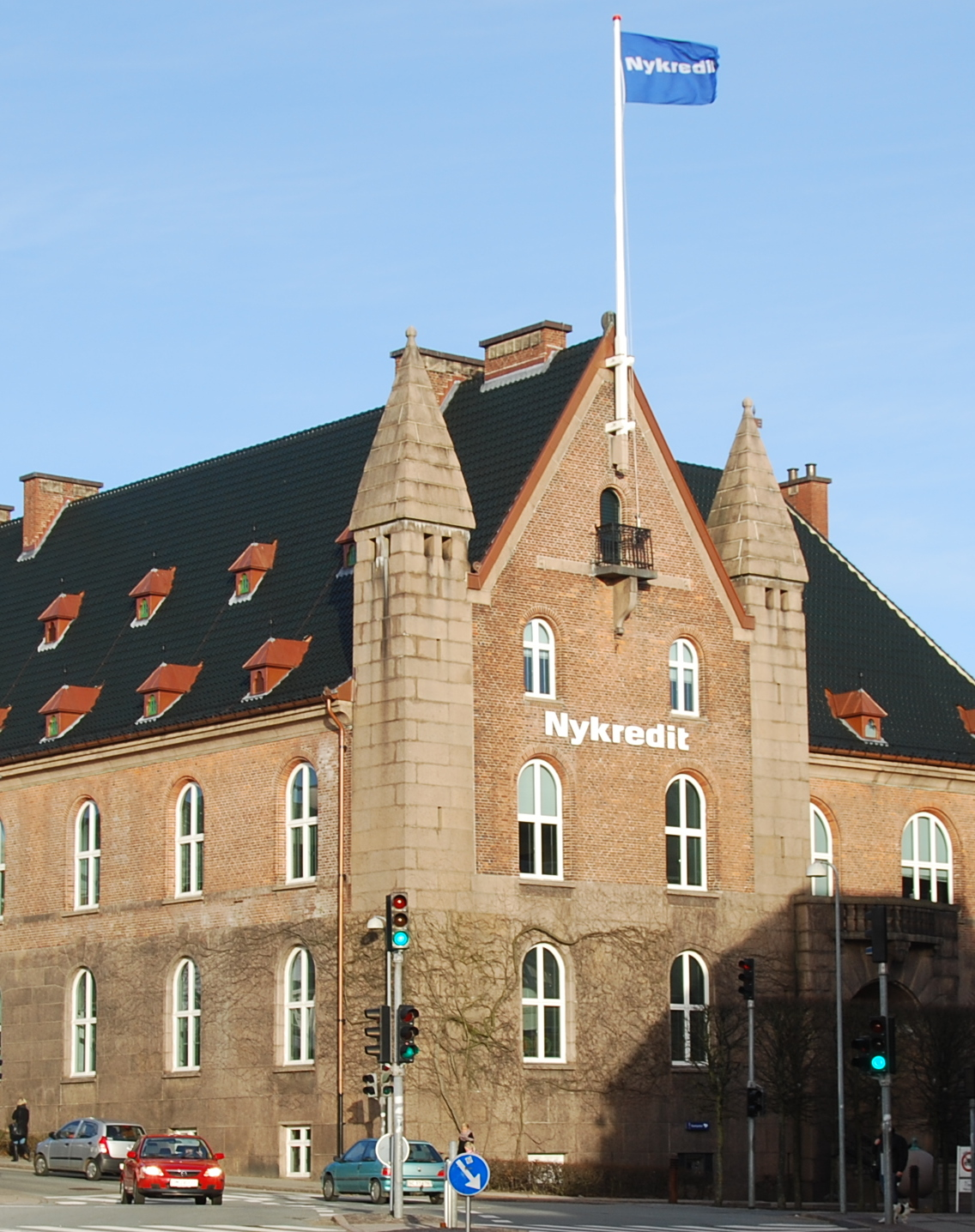 Nykredits bygning i Viborg, placeret i Sct. Mathias Gade 1.